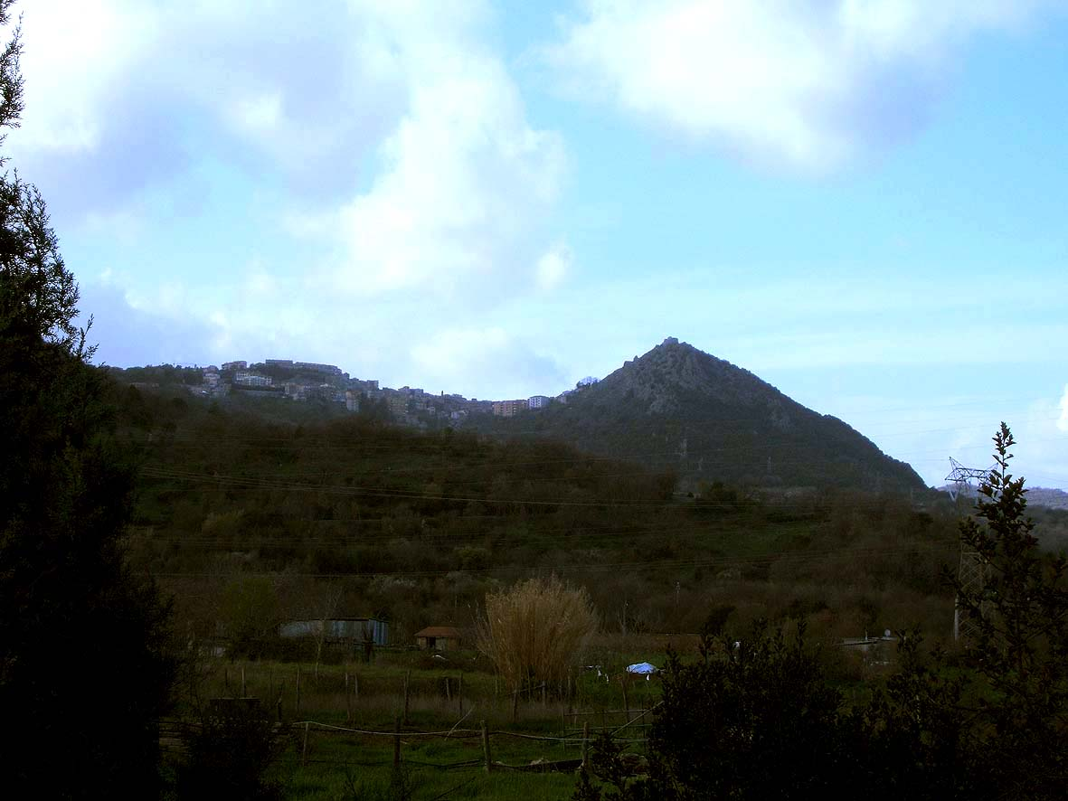 Panorama di Tolfa RM